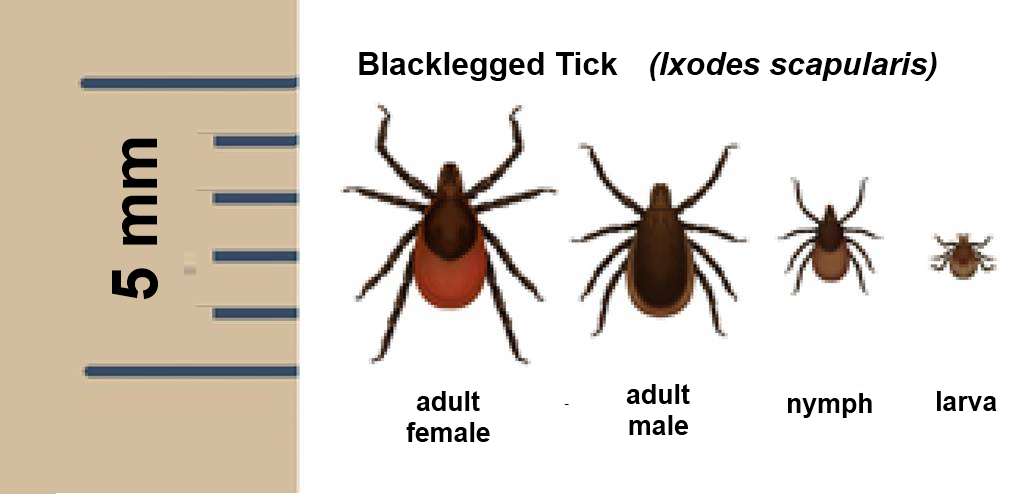 Ixodes scapularis larva, nymfi ja aikuiset puutiaiset kokovertailu